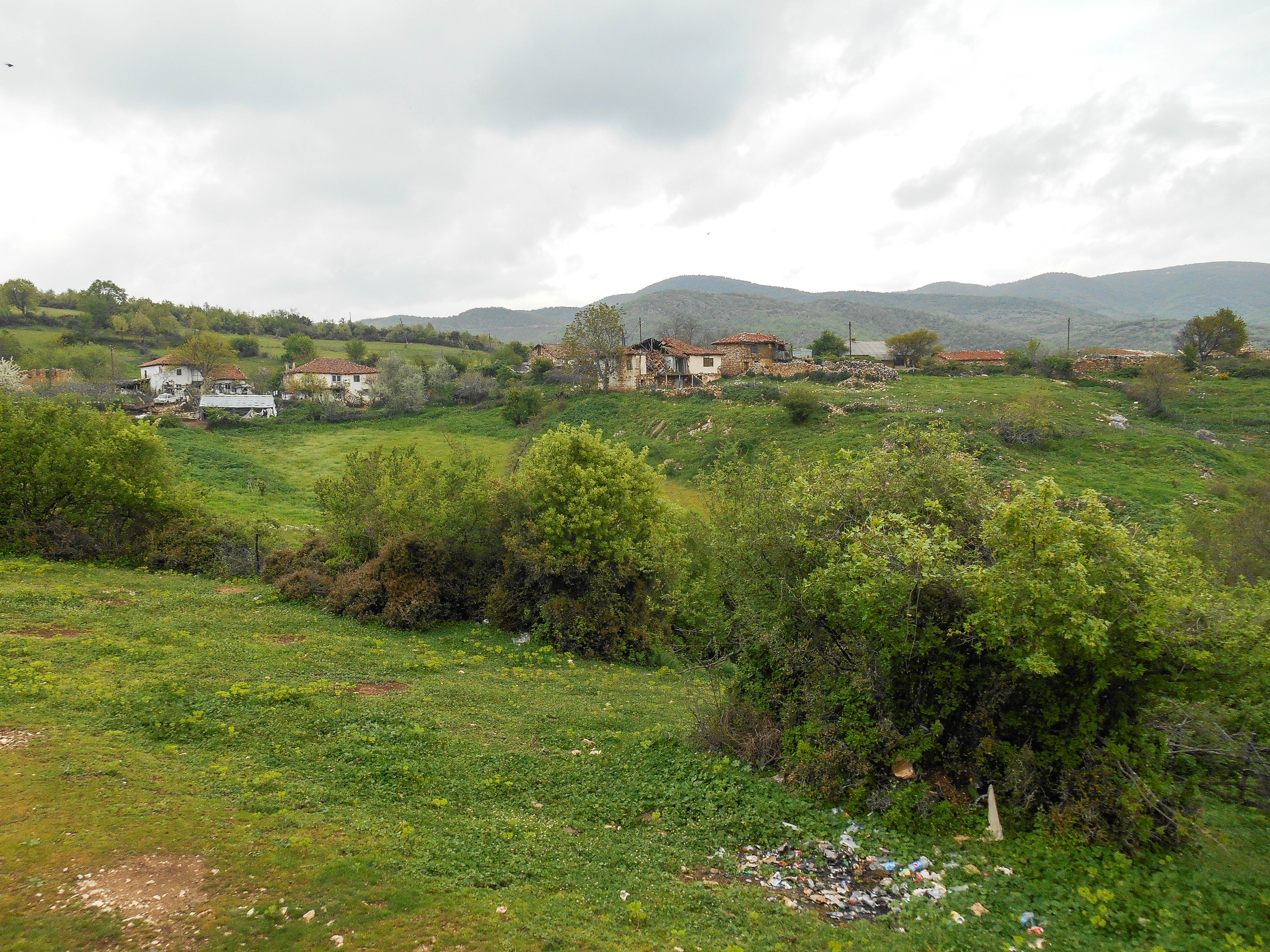 Мемешли